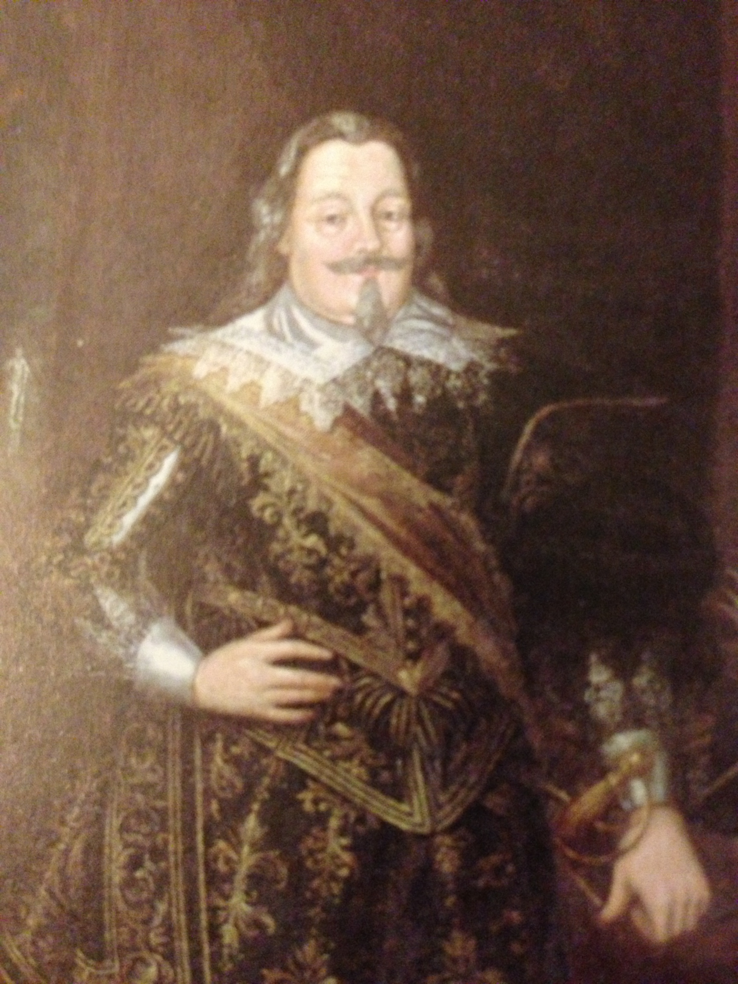 Graf Ludwig Günther I. von Schwarzburg-Rudolstadt- Die Fotografie wurde im Dezember 2012 erstellt.